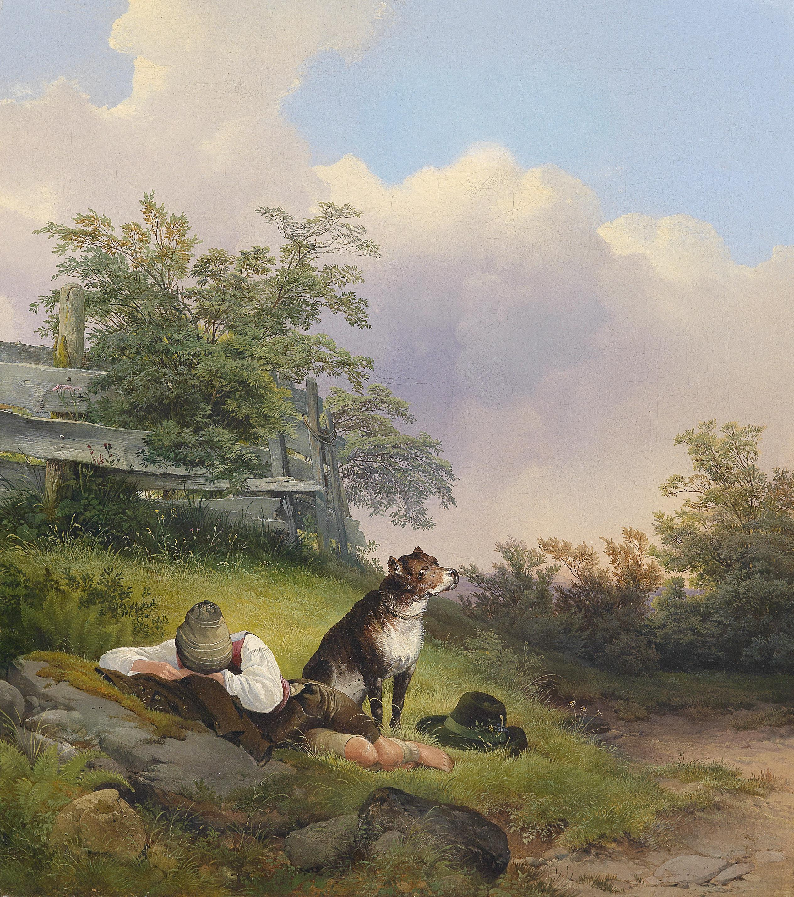 Schlafender junger Mann mit seinem wachsamen Hund